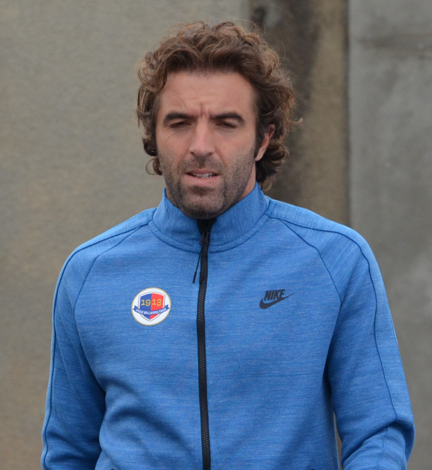 Photographie prise à l'occasion de la rencontre amicale opposant le Stade Malherbe de Caen au Stade rennais, le 9 juillet 2014 au stade Pierre-Comte de Vire. Ici, José Saez.